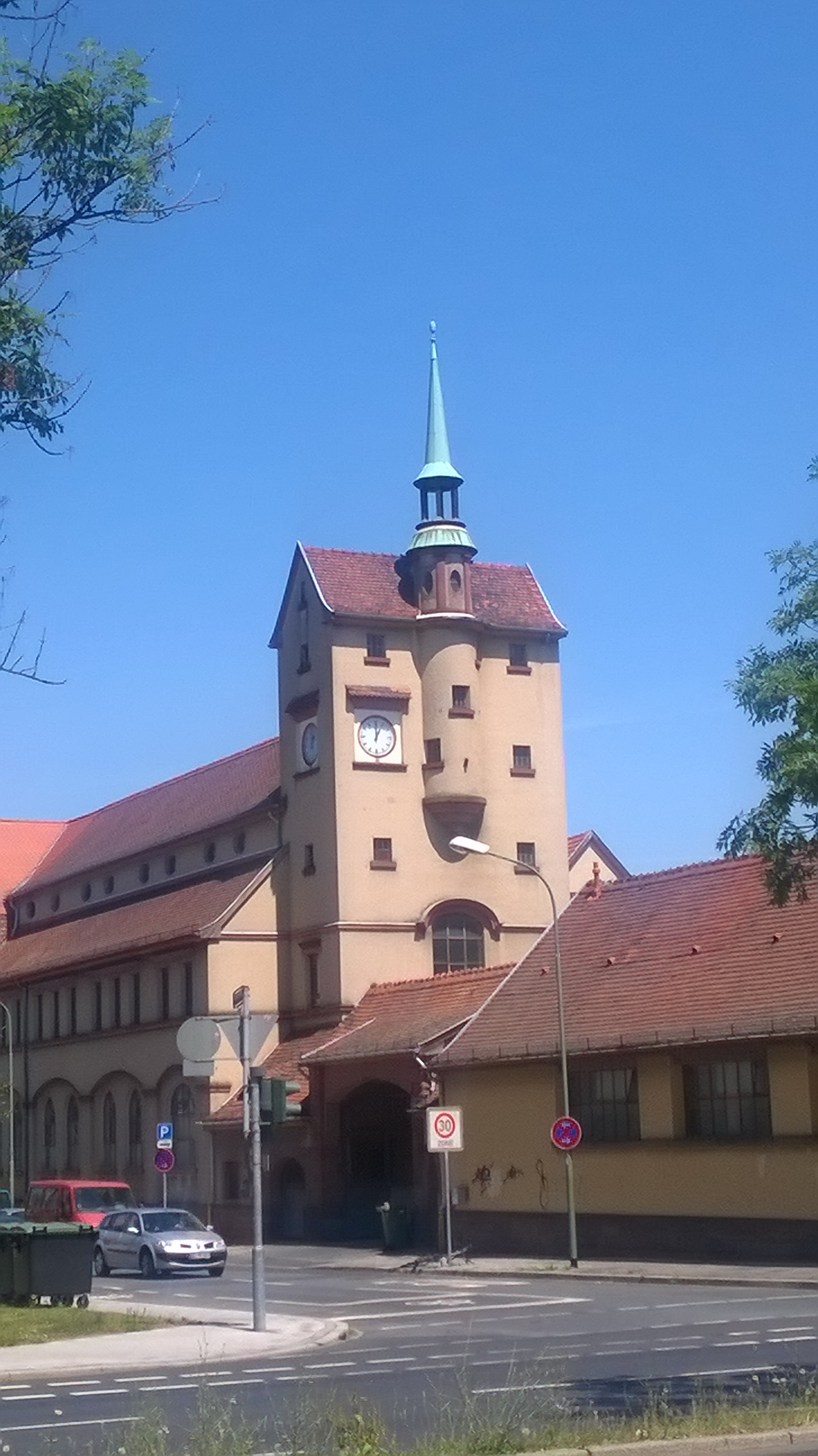 Sozialgebäude und Badehaus Mainstraße 169